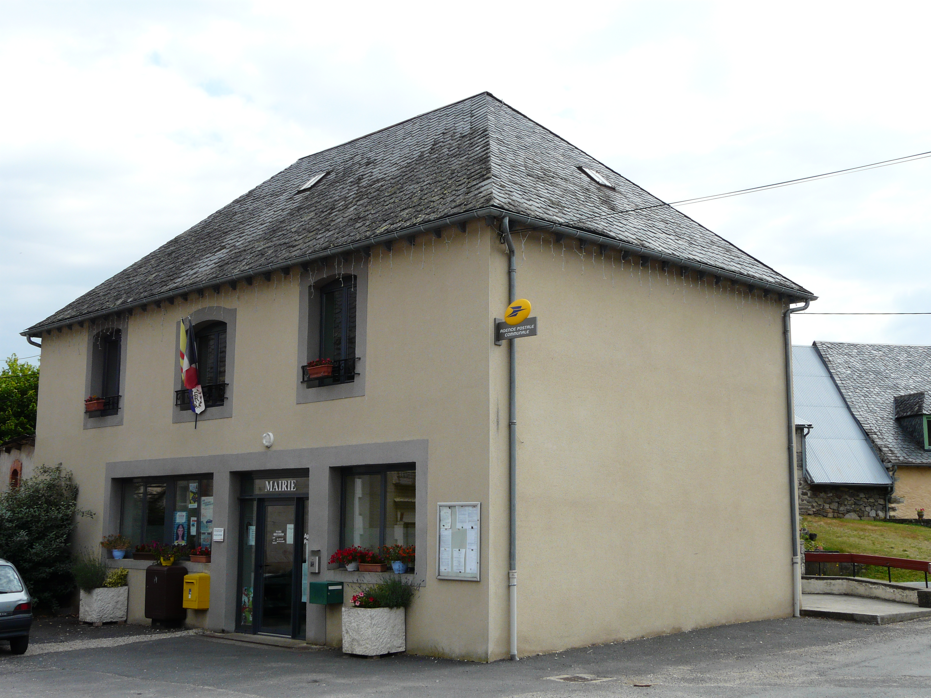 La mairie de Vebret, Cantal, France.